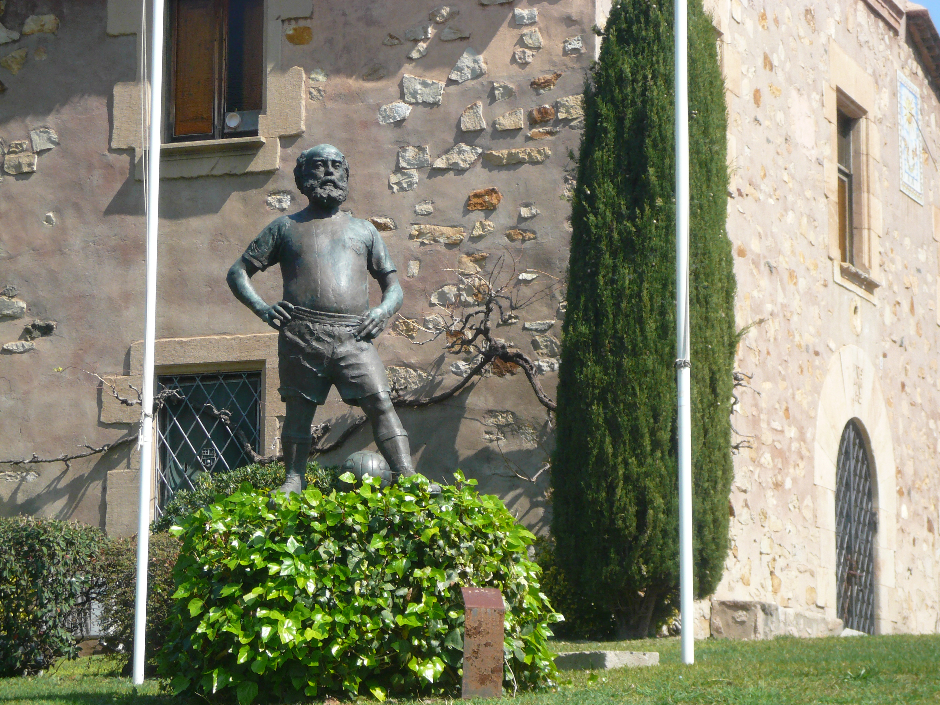 L'Avi. Av. Joan XXIII, entrada masia del Barça (Barcelona). Escultor: Josep Viladomat. Material: bronze. 1972. 48″ N, 2° 07′ 22.73″ E